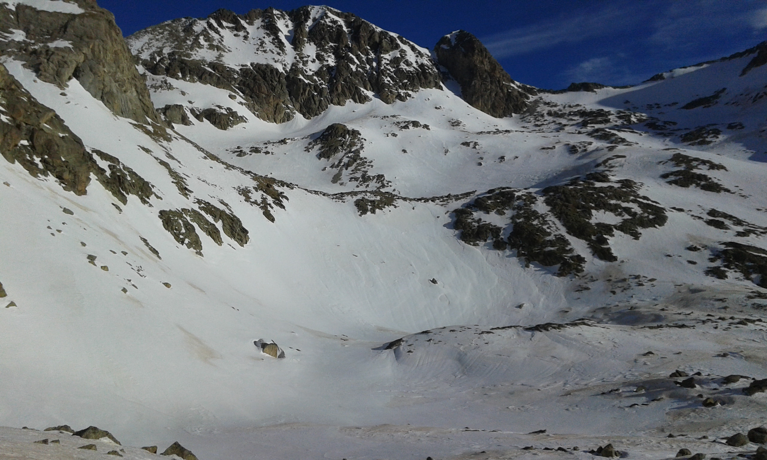 Vall d'Estós